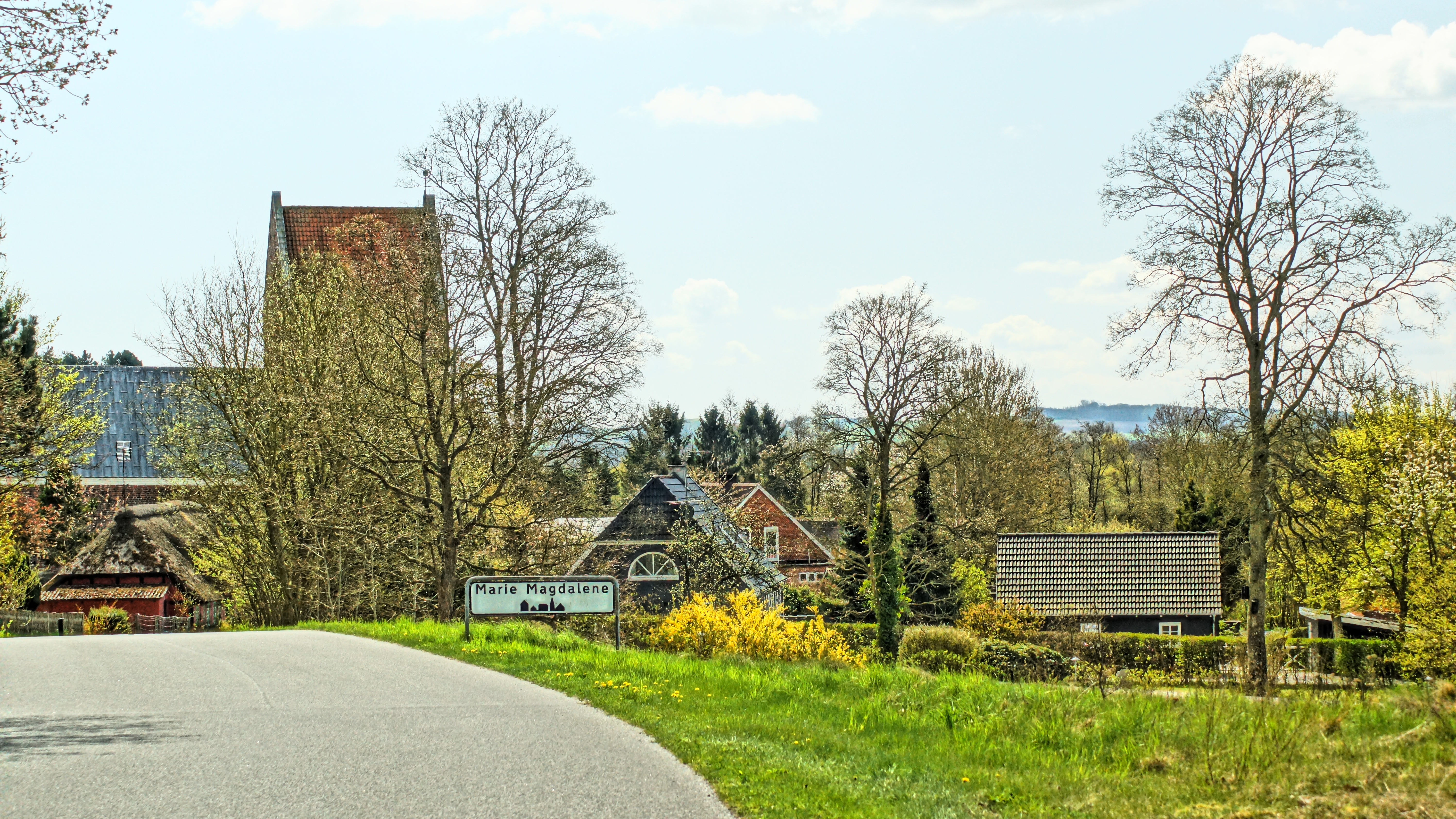 Marie Magdalene, landsby på Djursland, forår 2015